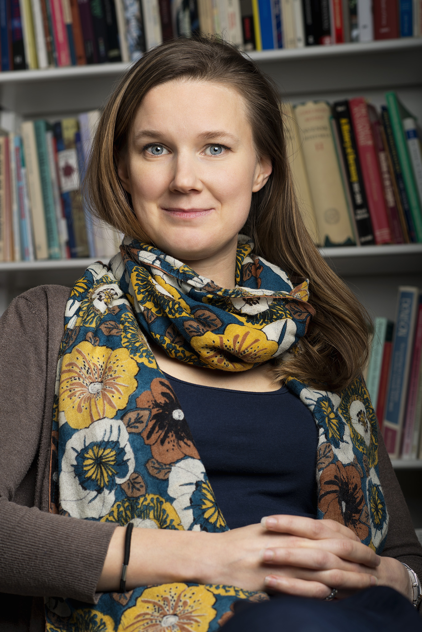 Karin Svanborg-Sjövall, VD för tankesmedjan Timbro.